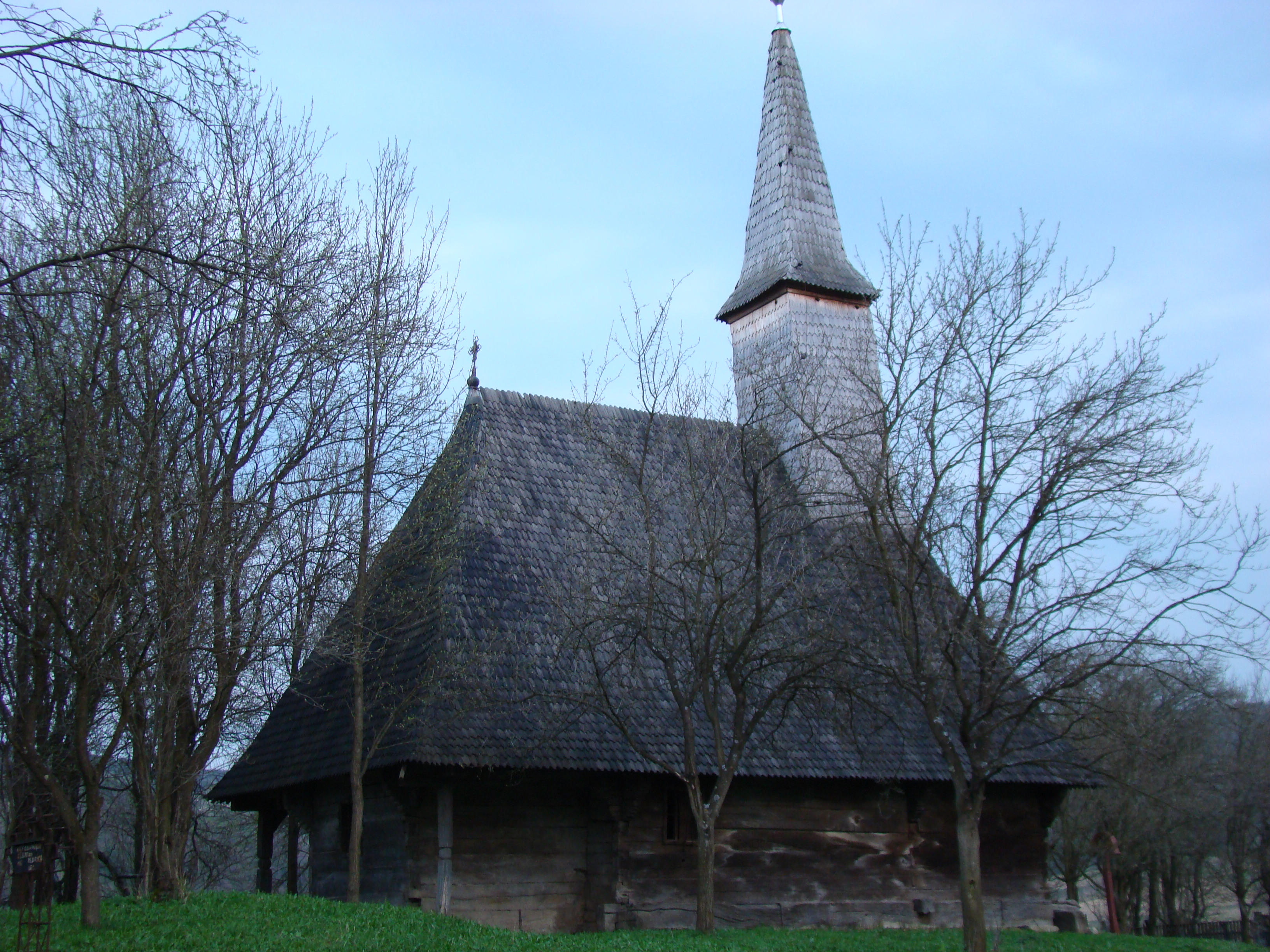 Biserica de lemn din Calna, judeţul Cluj - vedere din nord.